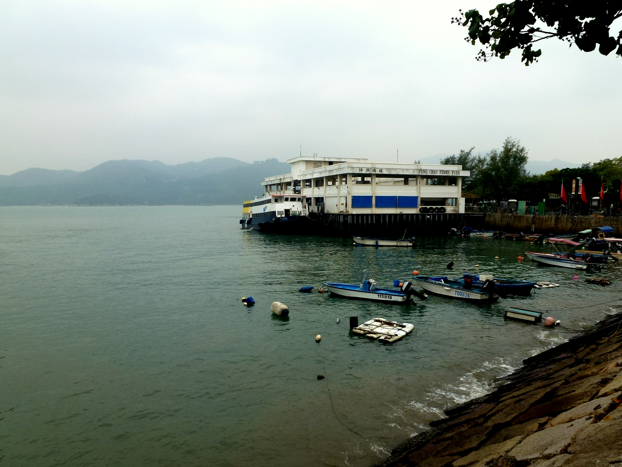 Peng Chau Ferry Pier Peng Chau Island Hong Kong